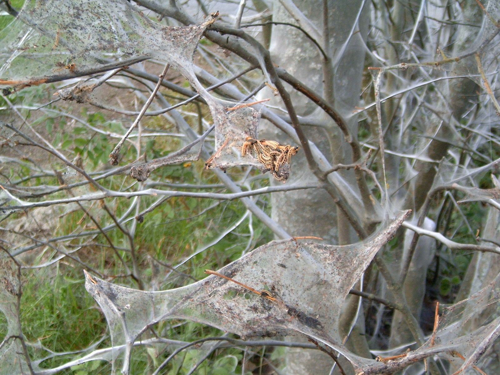 Yponomeuta evonymella (häggspinnmal, spökträd, ghost tree)